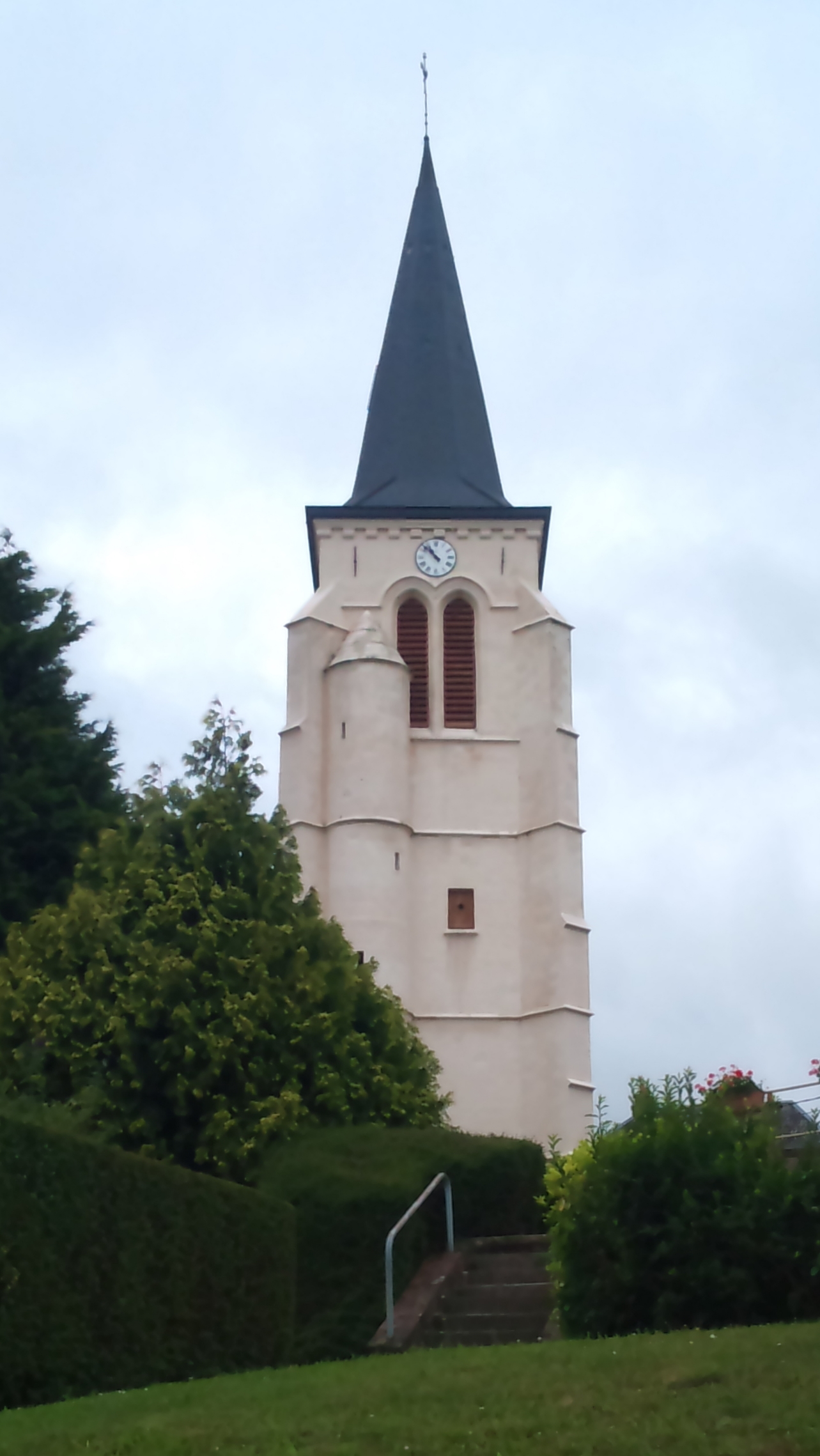 Wavrechain sous Faulx - l'église